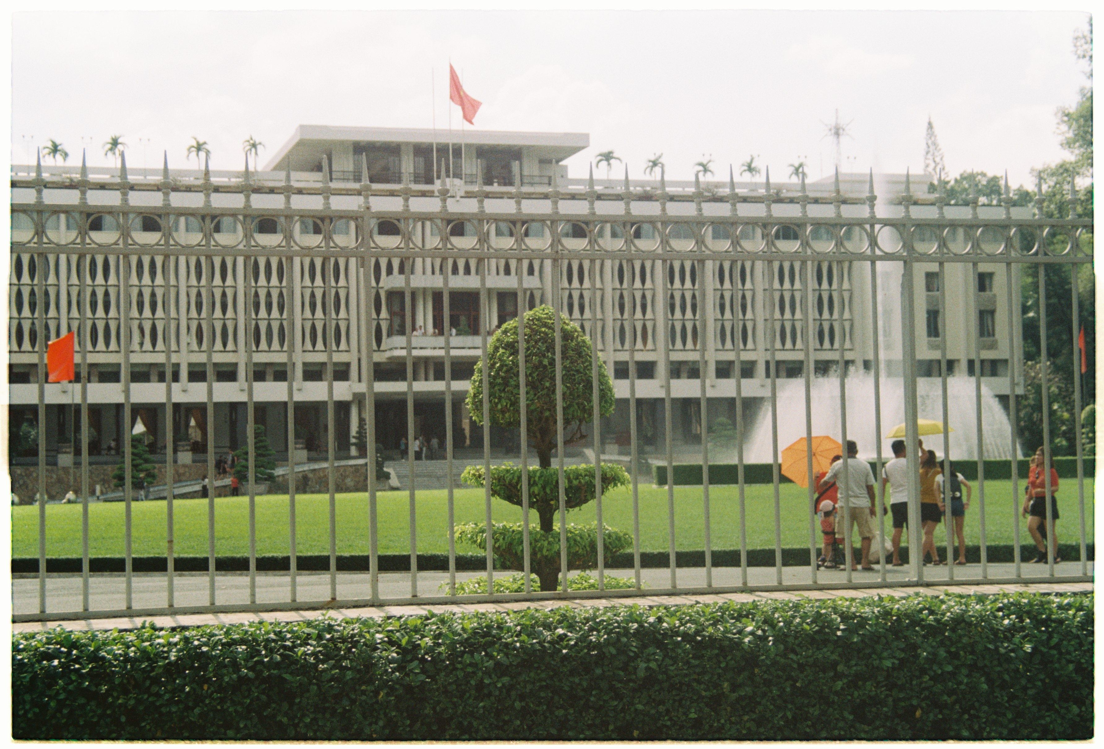 Dinh Độc Lập tại số 135 Nam Kỳ Khởi Nghĩa